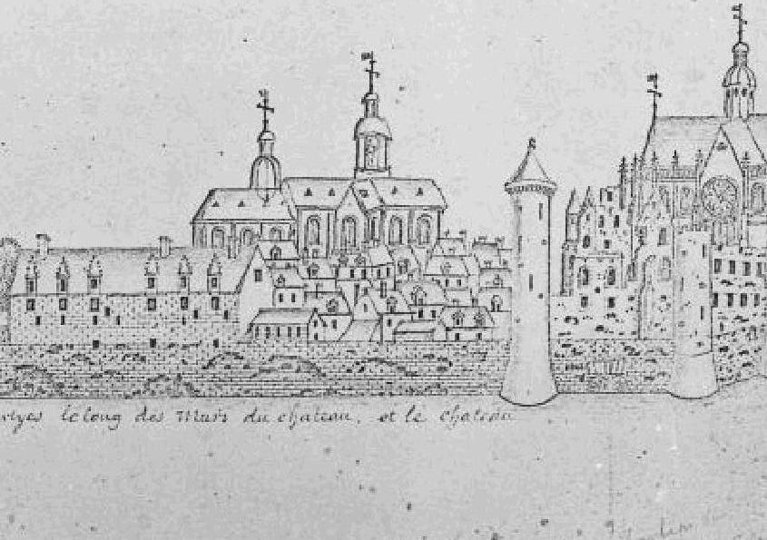 Collégiale Saint Martin de la Bazoche au centre, entre le logis des Gouverneur à gauche et le château de Tours à droite, XVIIIe siècle, collection SAT N°2696